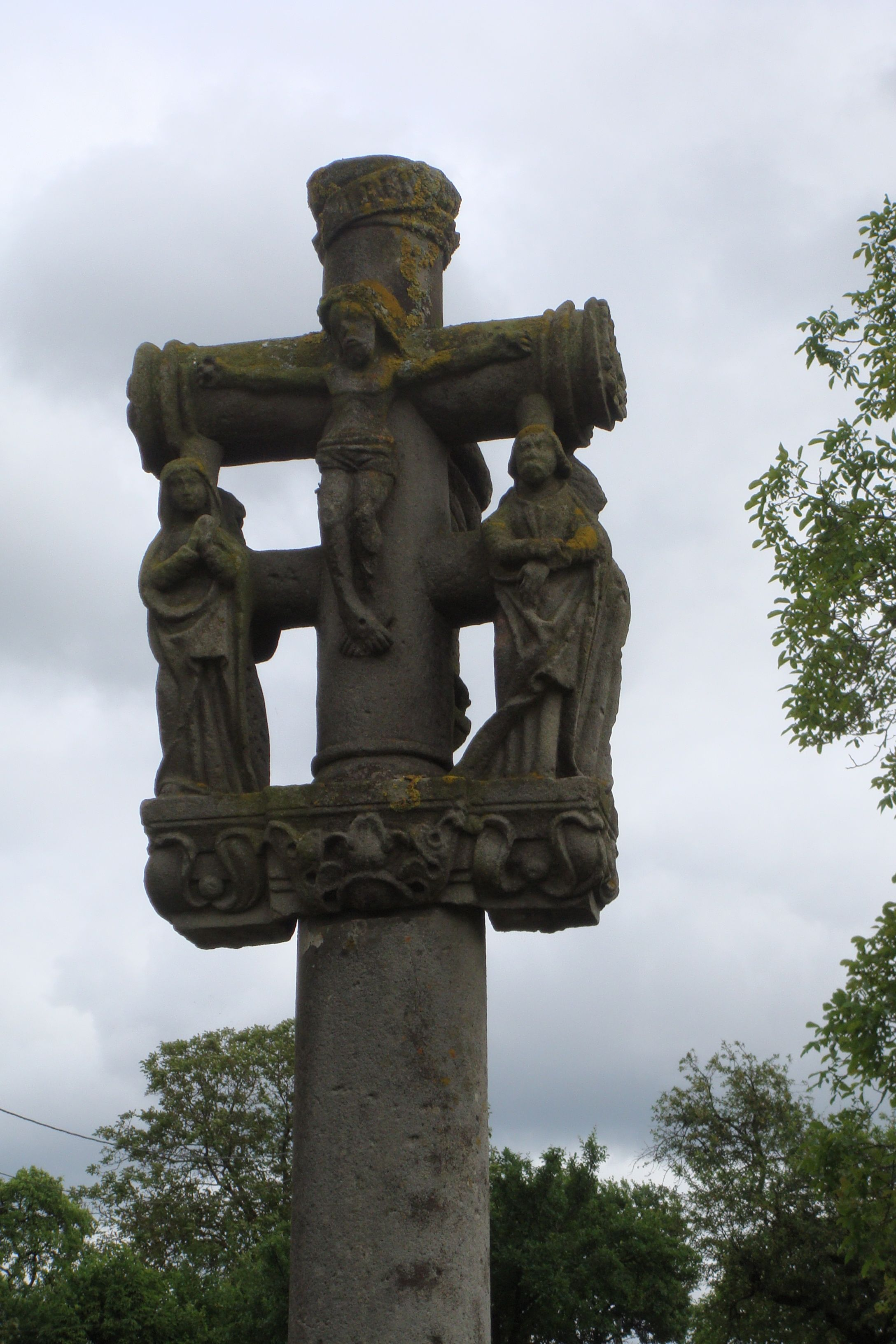 Croix du Breuil réimplantée rue Berton, vue de face (Christ en croix)